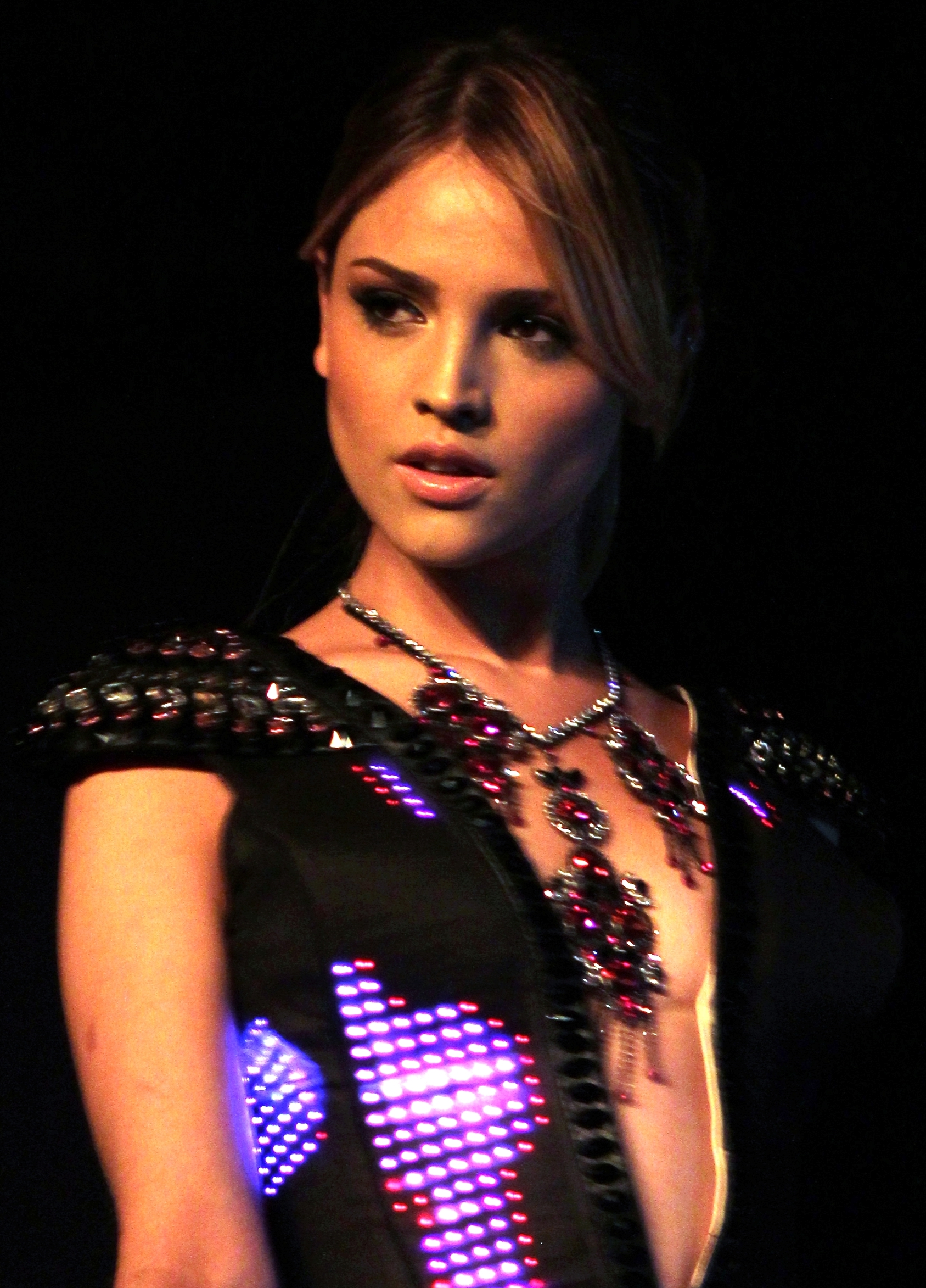 La cantante y actriz Eiza González durante el IDM pasarelas en CuteCircuit, 2013.